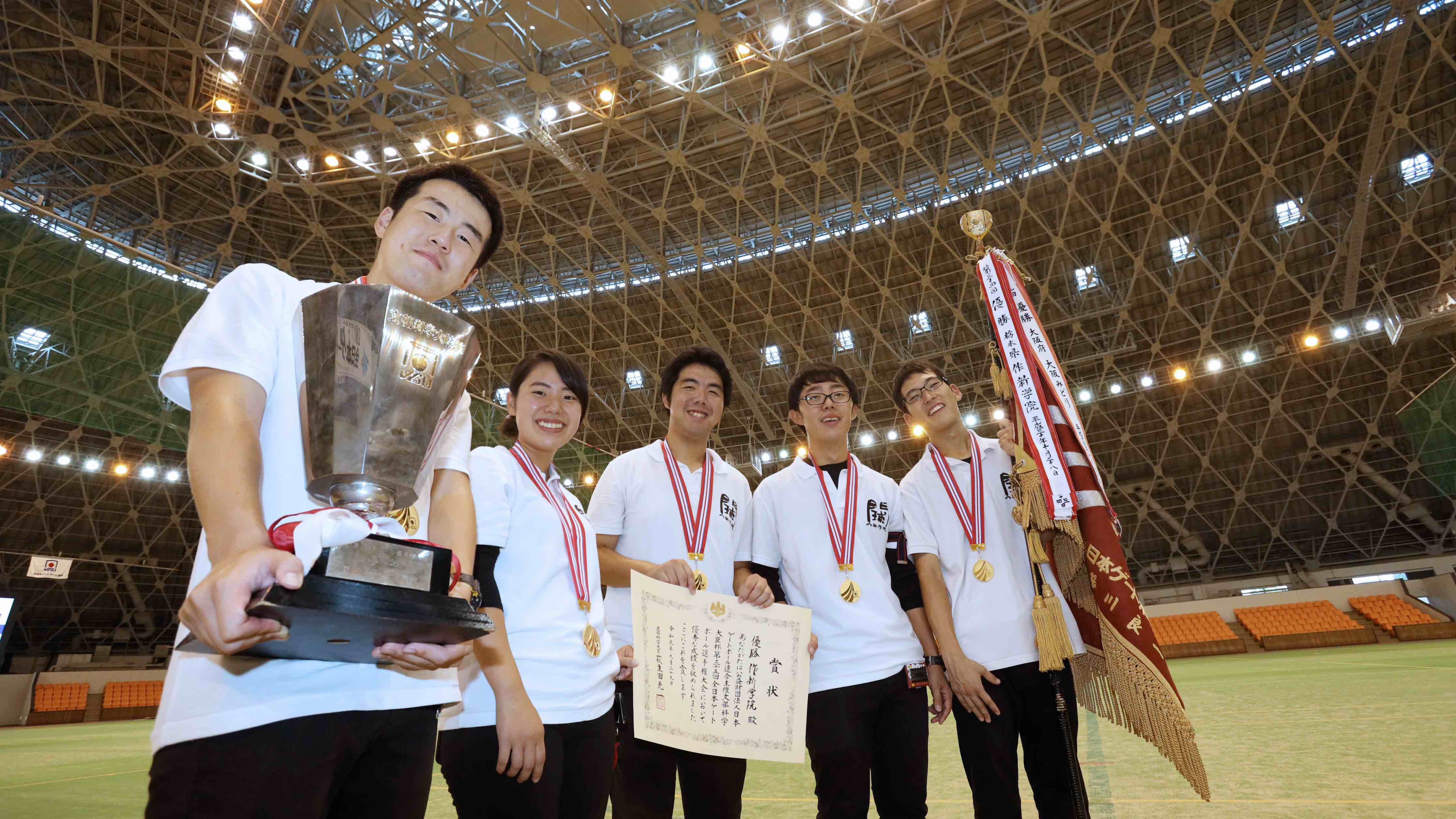 現在、２連覇中の作新学院（栃木）